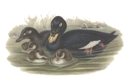 Melanitta fusca